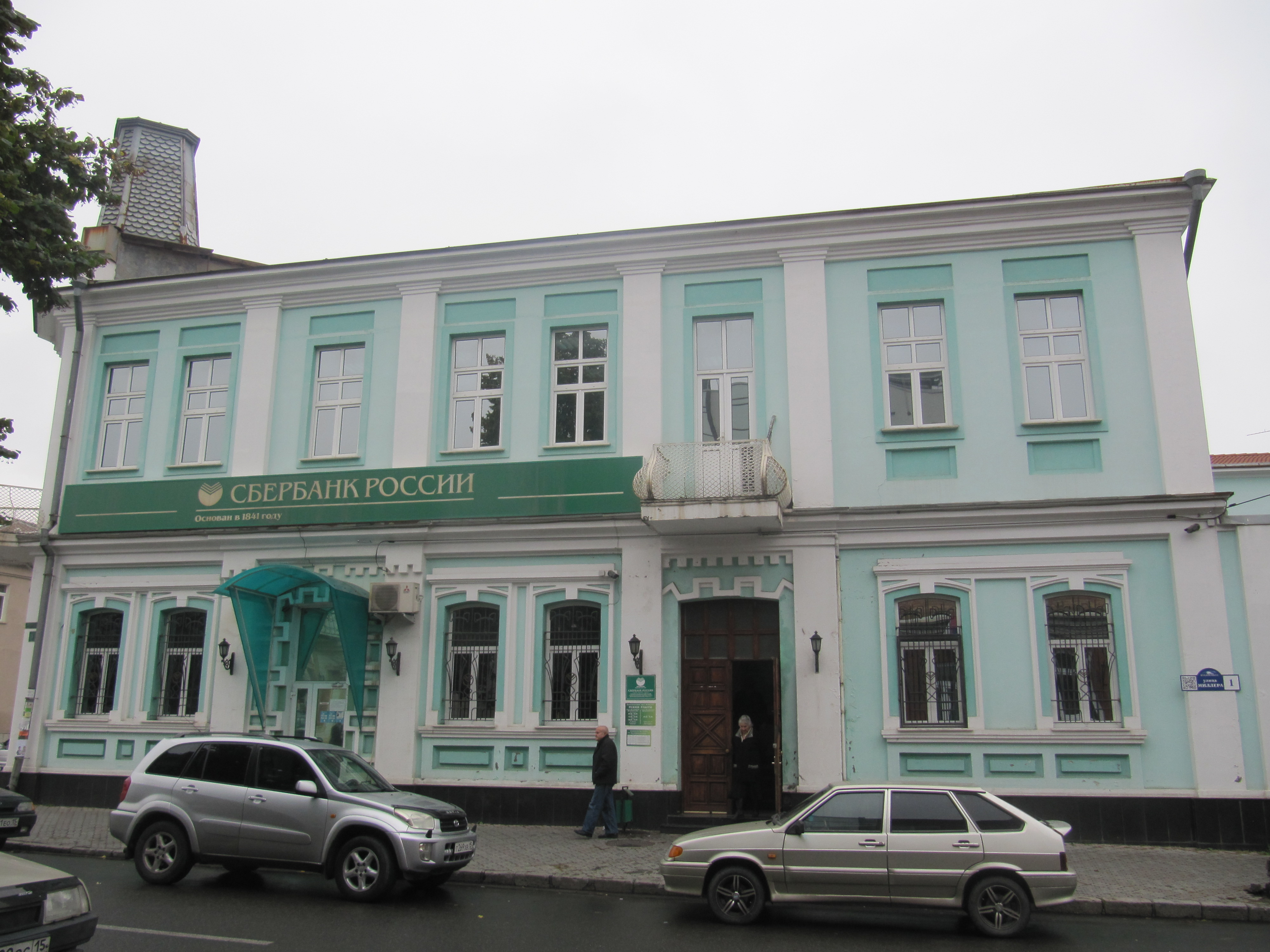 Улица Миллера, дом 1. Объект культурного наследия РФ.